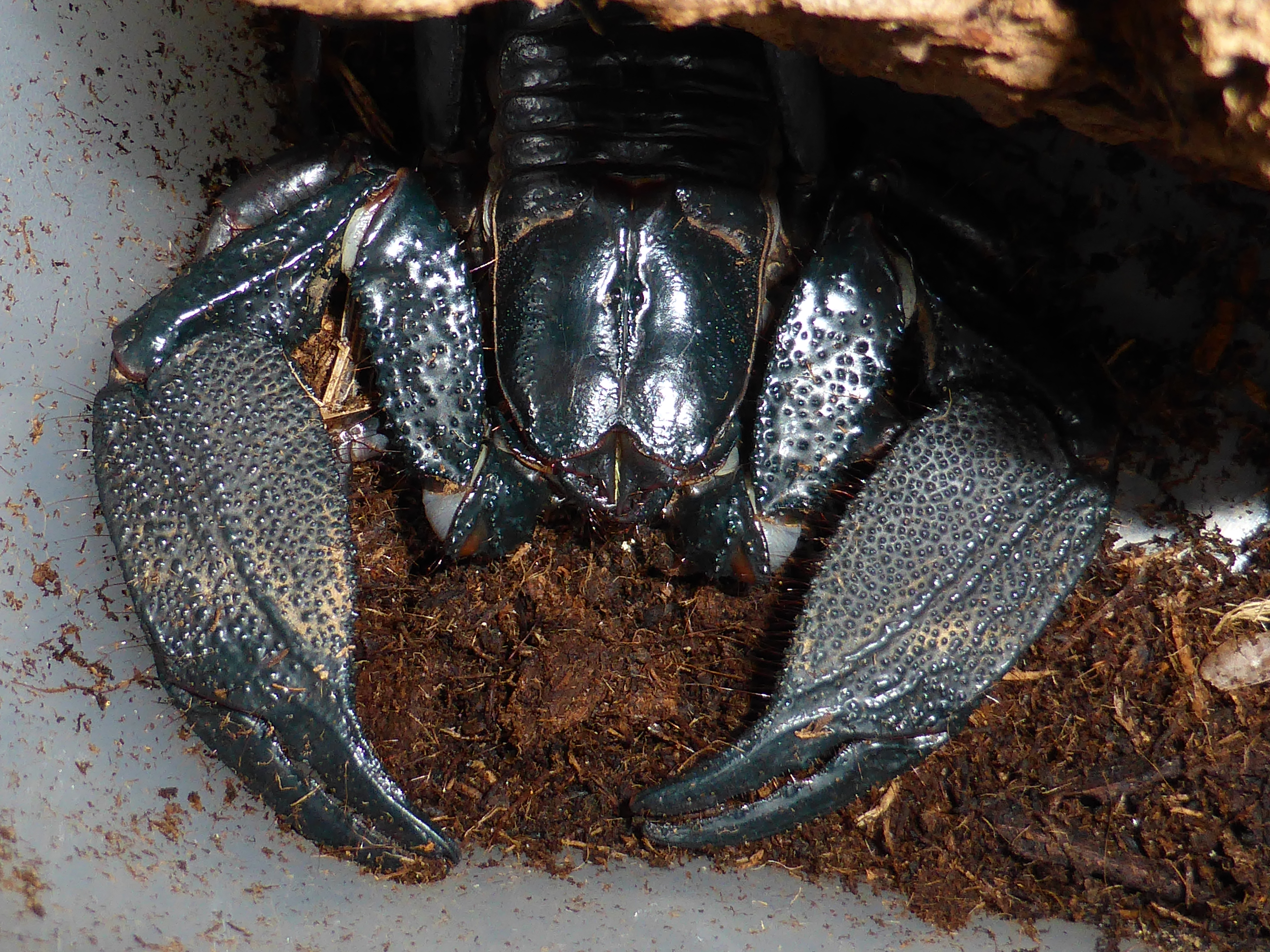 Heterometrus mysorensis, mâle